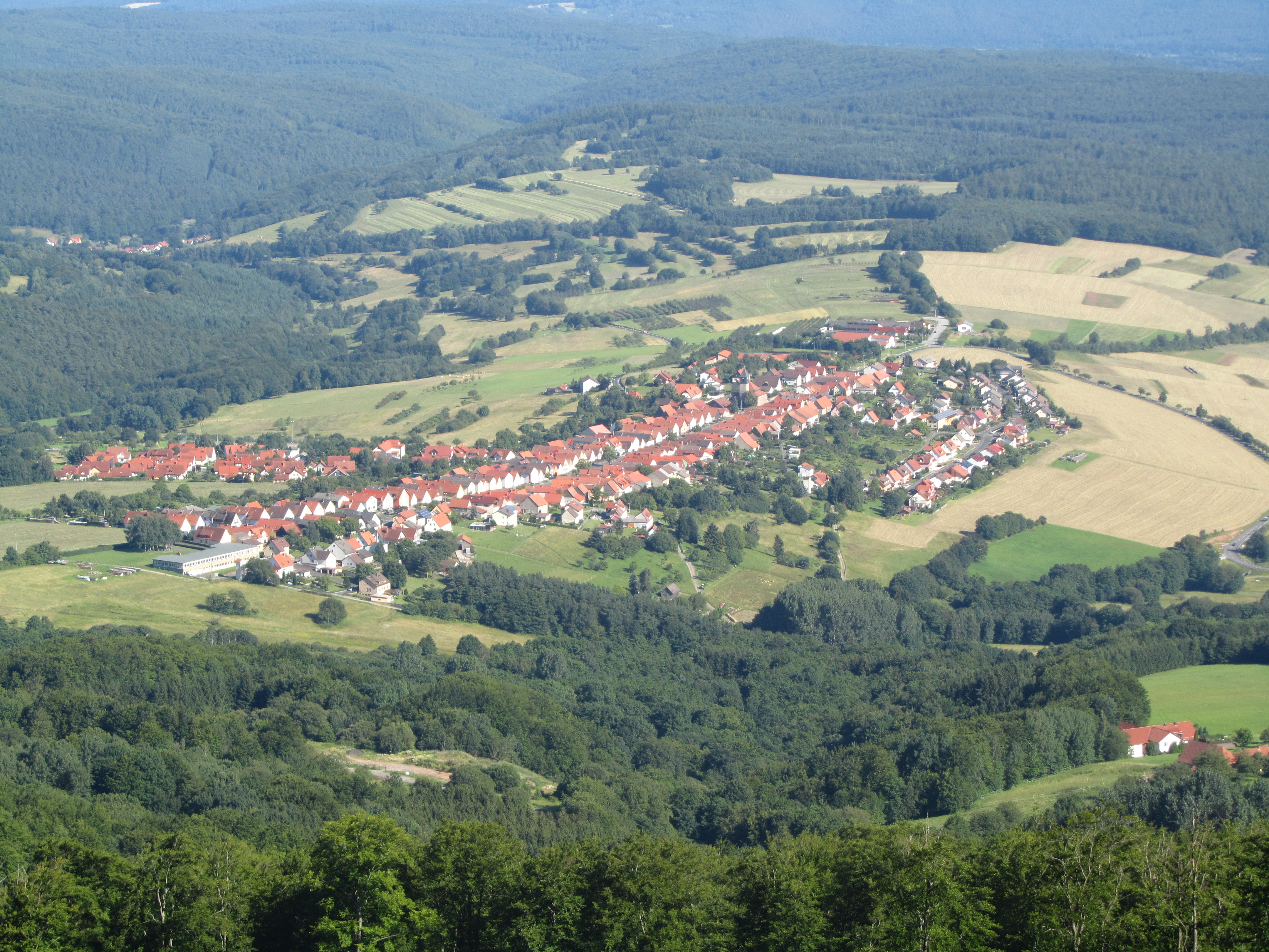 Sandberg im bayerischen Landkreis Rhön-Grabfeld, gesehen vom Kreuzberg